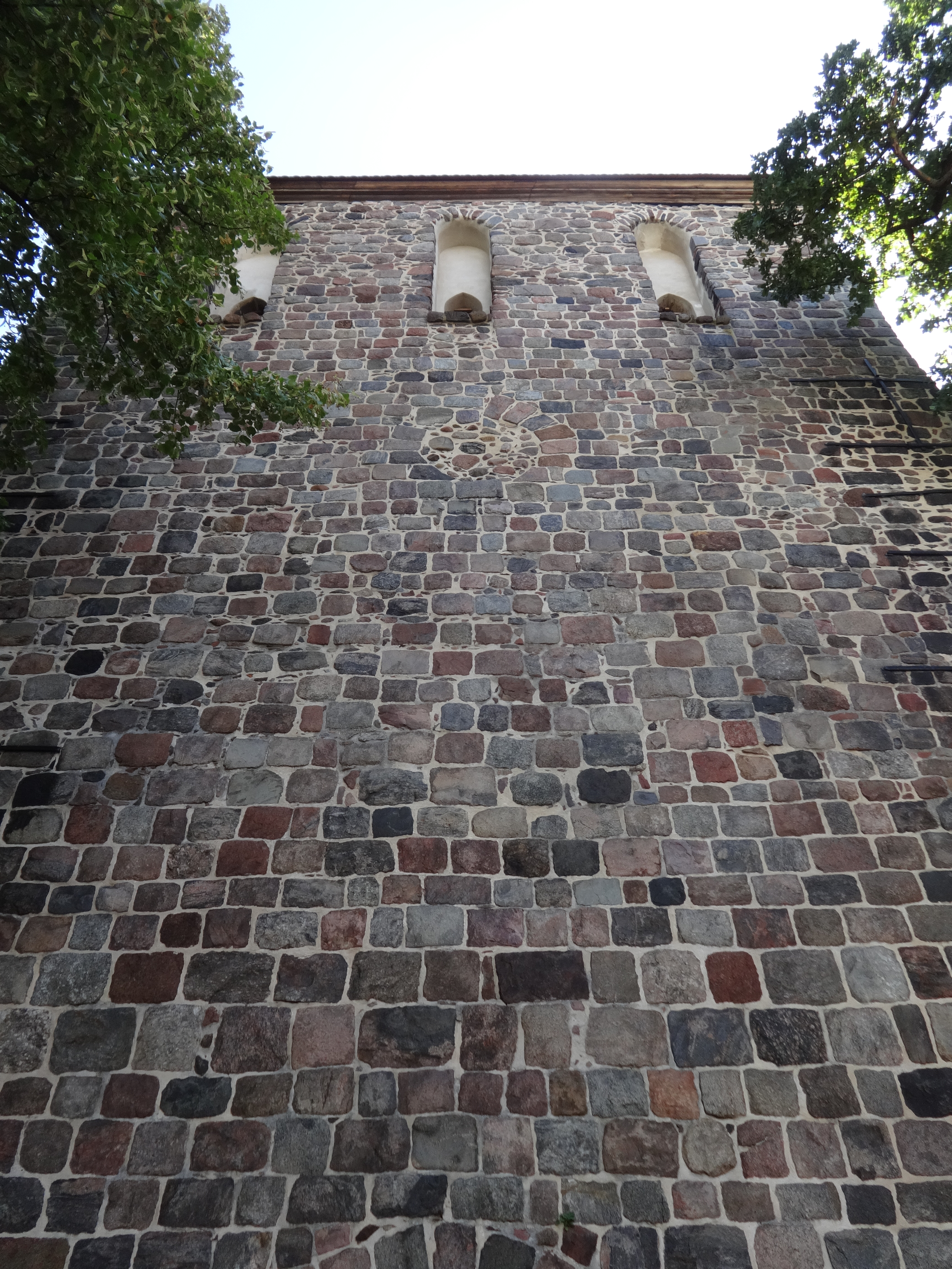 Die Feldsteinkirche in Waltersdorf ist ein spätromanischer Saalbau aus der Mitte des 13. Jahrhunderts in der Gemeinde Schönefeld im Landkreis Dahme-Spreewald in Brandenburg.